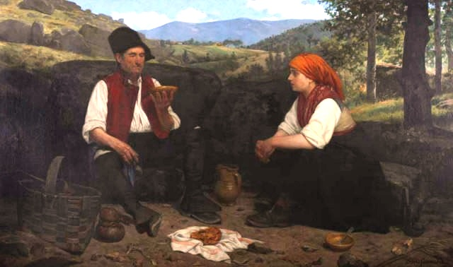 O xantar